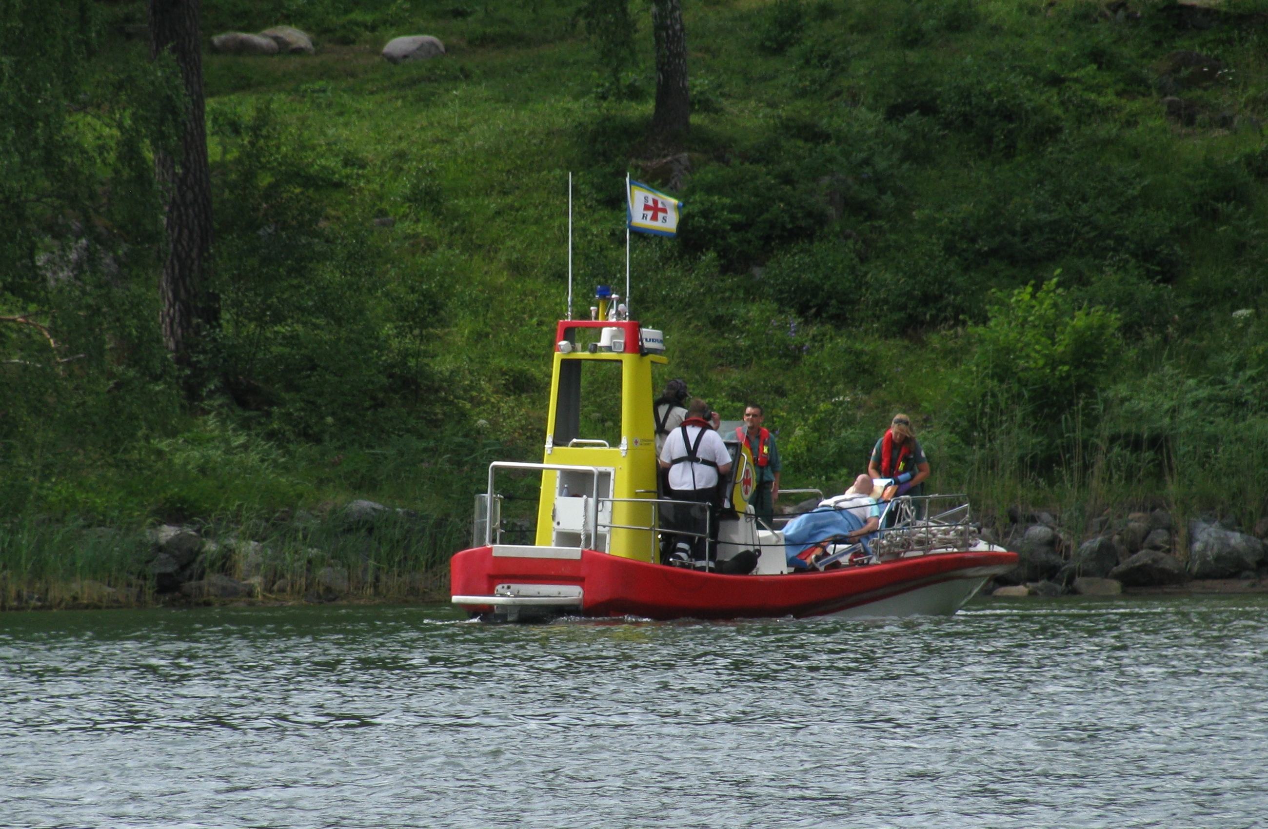 Sjöräddningssällskapet och ambulanspersonal hämtar en patient från en ö i Stockholms skärgård. Källa: eget foto, fotograf EnDumEn 4 juli 2009.